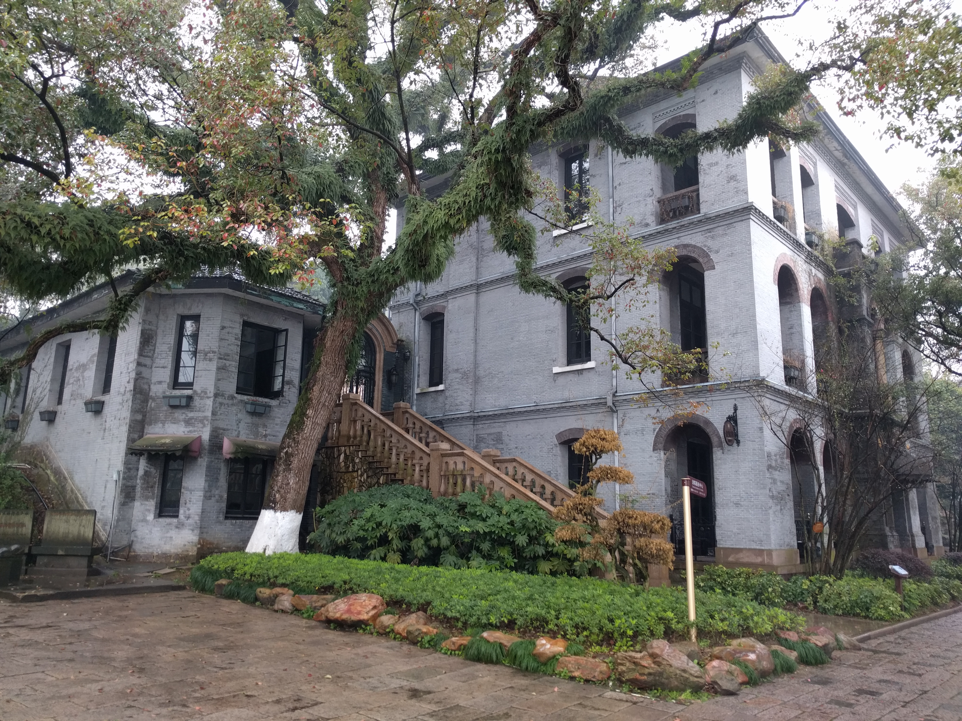 浙江省温州市江心屿英国领事馆